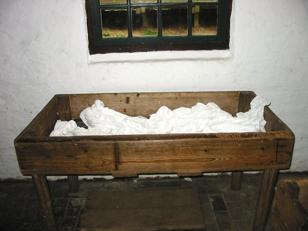 Lompentafel (Foto: Hans de Kroon)